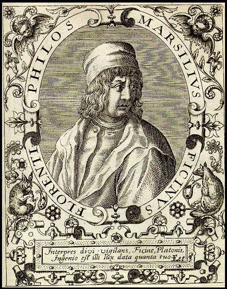 Marsilio Ficino (1433-1499)